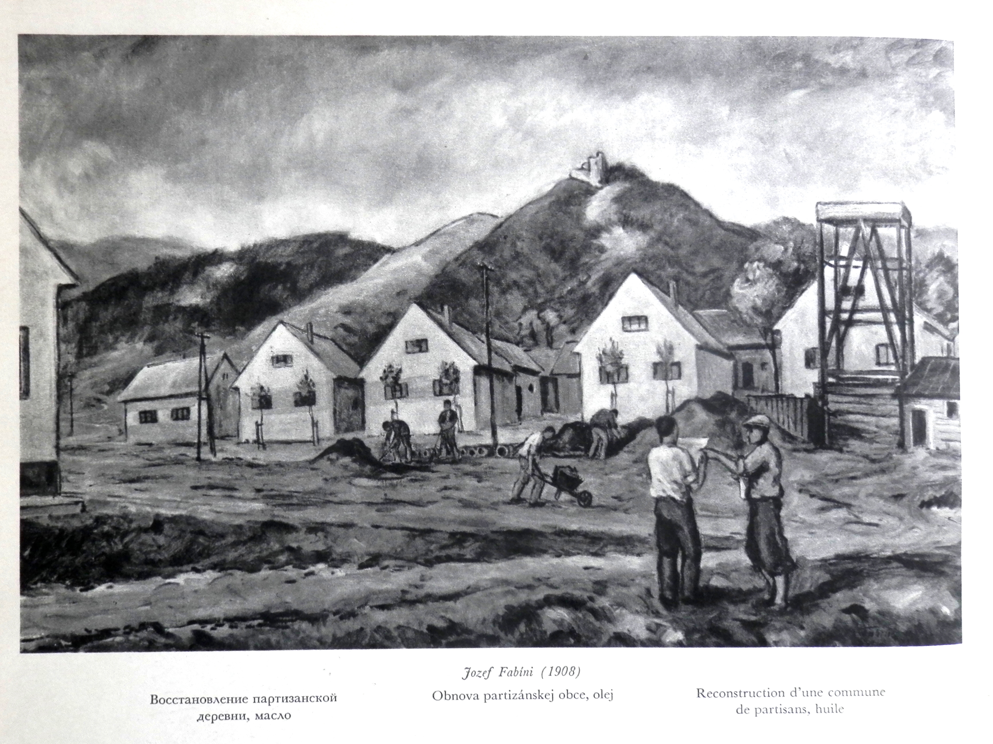 Slovenské výtvarné umenie v dobovej tlači 1947. Digitalizácia obrázku – Obnova partizánskej obce. Autor výtvarného diela: Jozef Fabíni. Slovensko.